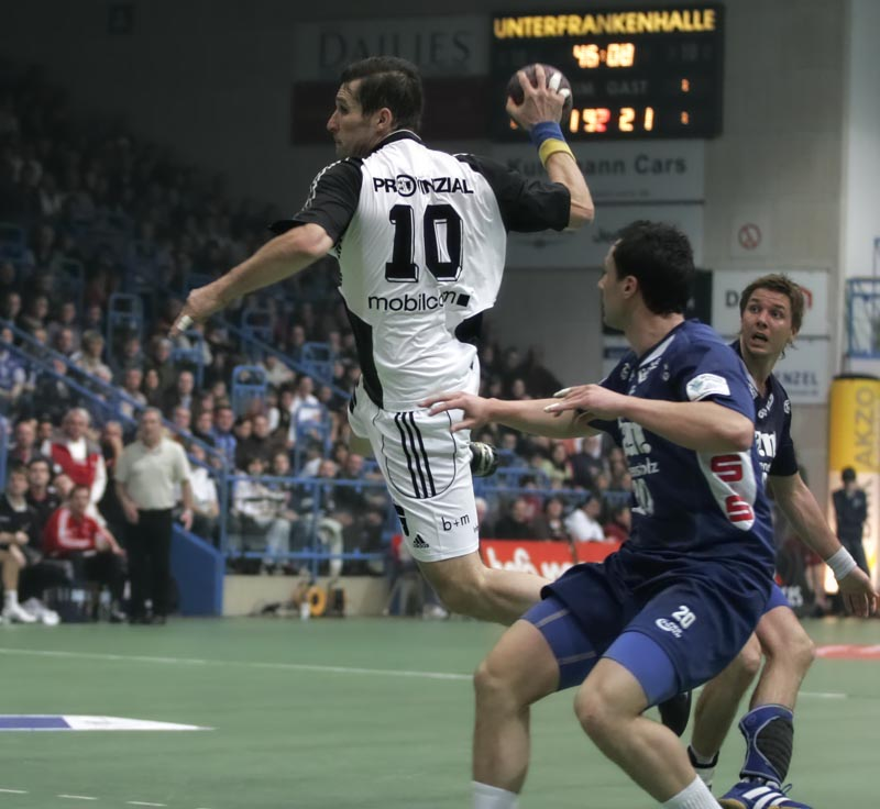 Stefan Lövgren, on December 30th 2006 in Aschaffenburg (Germany), during the game TV Grosswallstadt - THW Kiel (25:30)